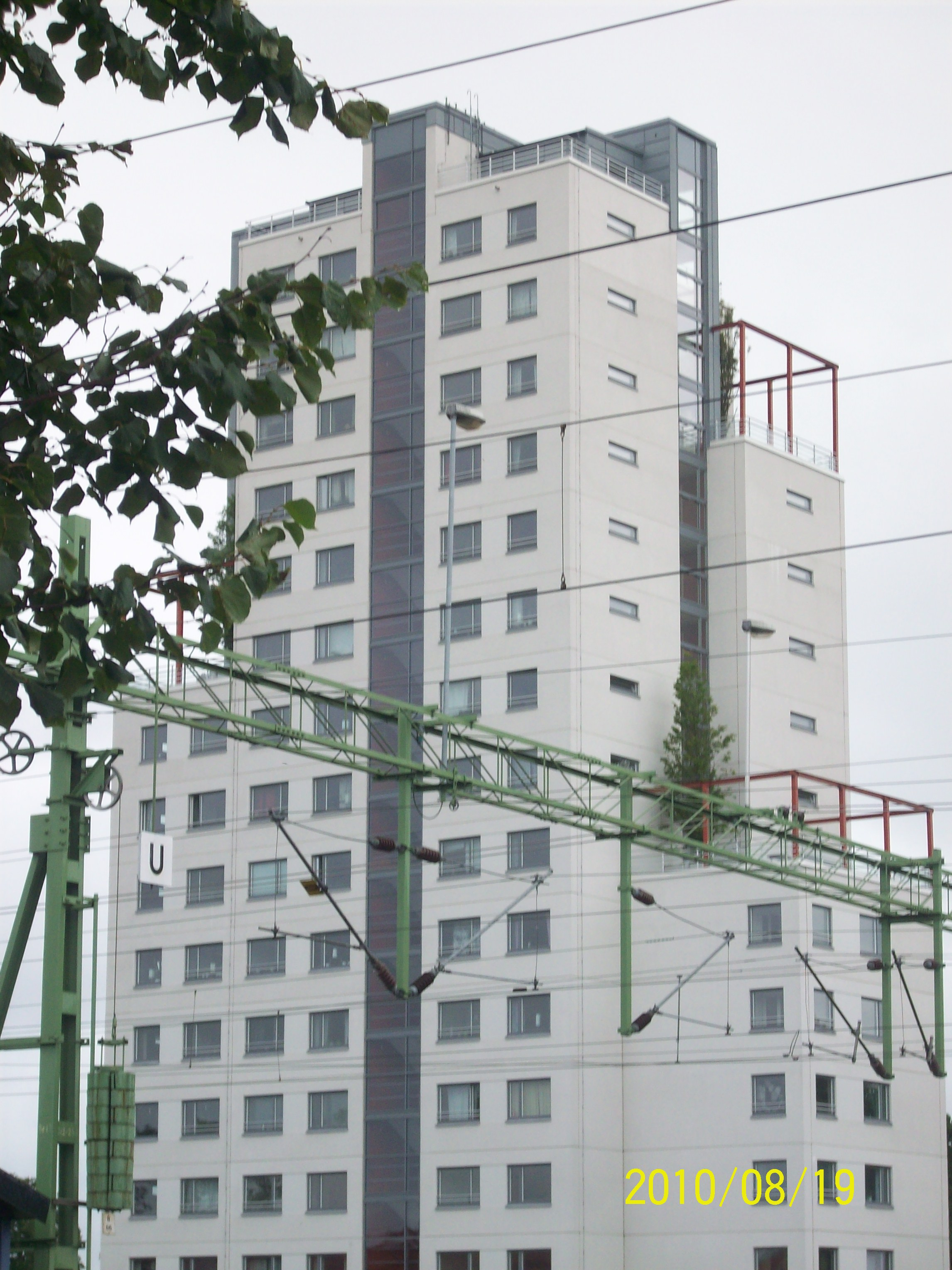 Studentskrapan i Skövde